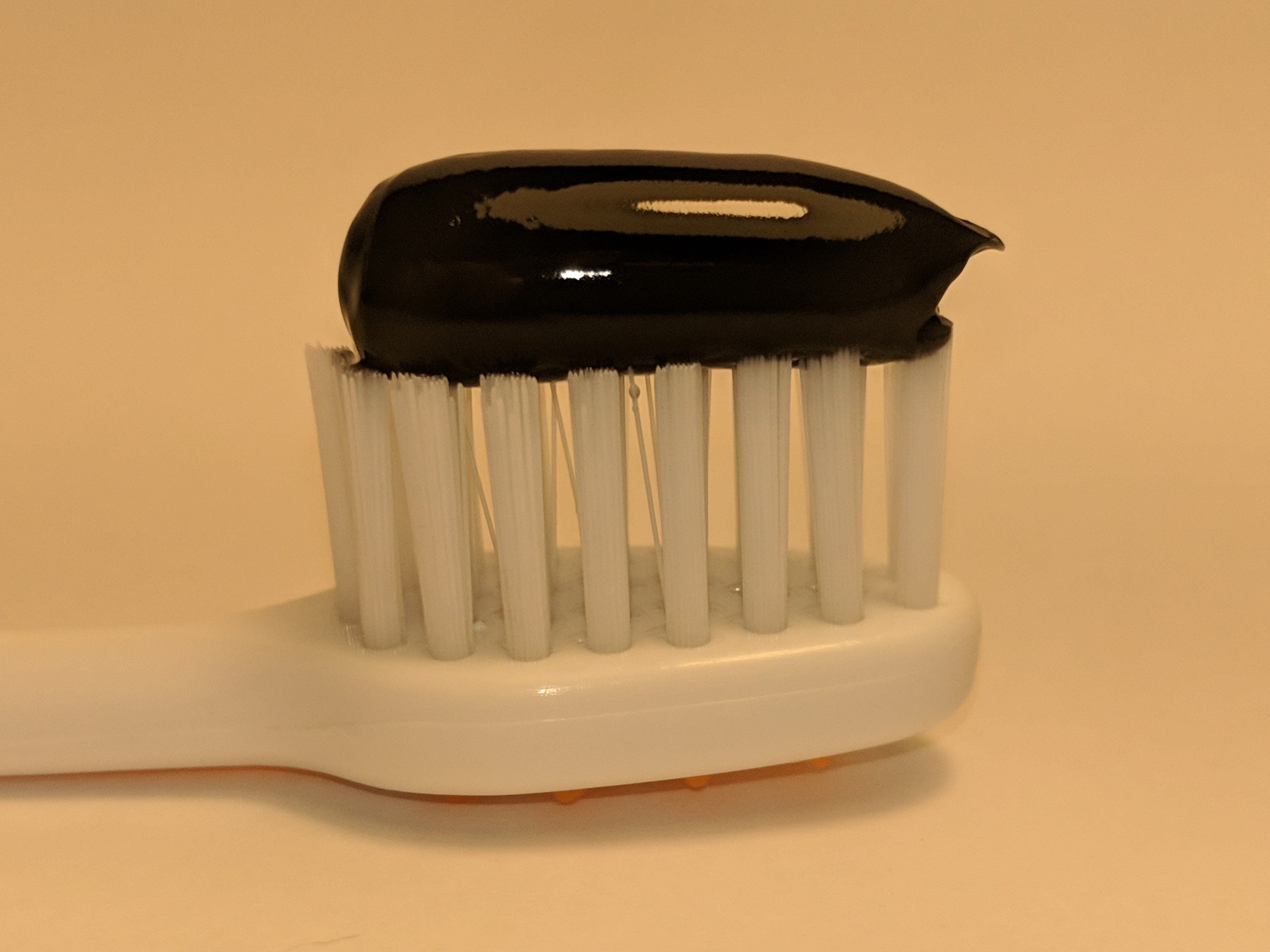 AktivkohleZahnpasta